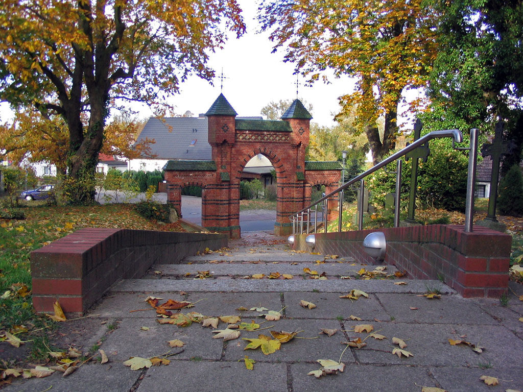 Hauptzugang zur Kirche in Prohn